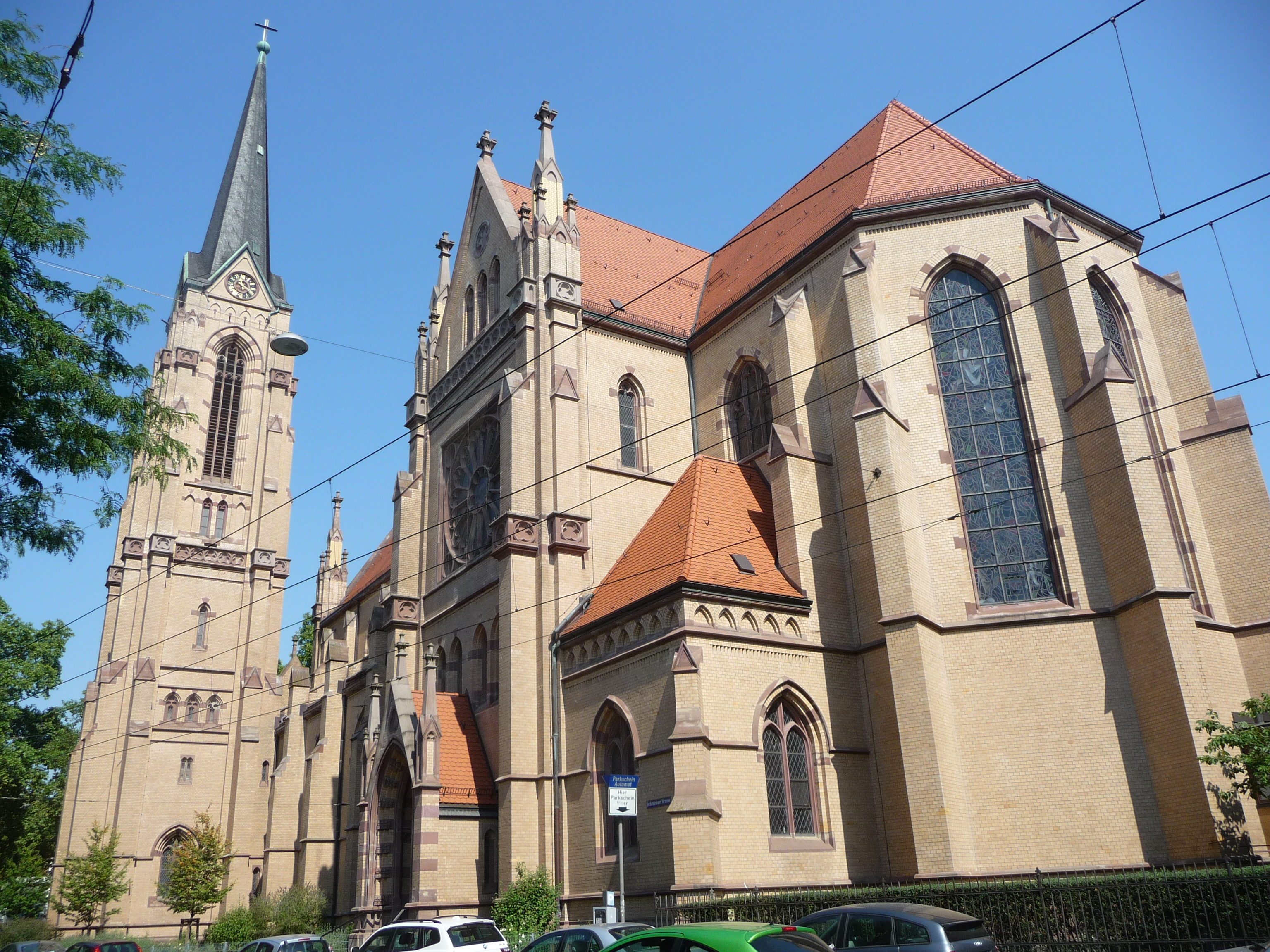 Die Heilig-Geist-Kirche in Mannheim ist eine große neugotische Kirche der Katholiken im Stadtbezirk Schwetzingerstadt/Oststadt. Sie wurde zwischen 1898 und 1903 nach den Plänen von Ludwig Maier erbaut. Die Wandflächen des Außenbaus bestehen aus gelblichen Verblendklinkern, die architektonischen Gliederungselemente sind aus rotem Elsässer Sandstein gefertigt.